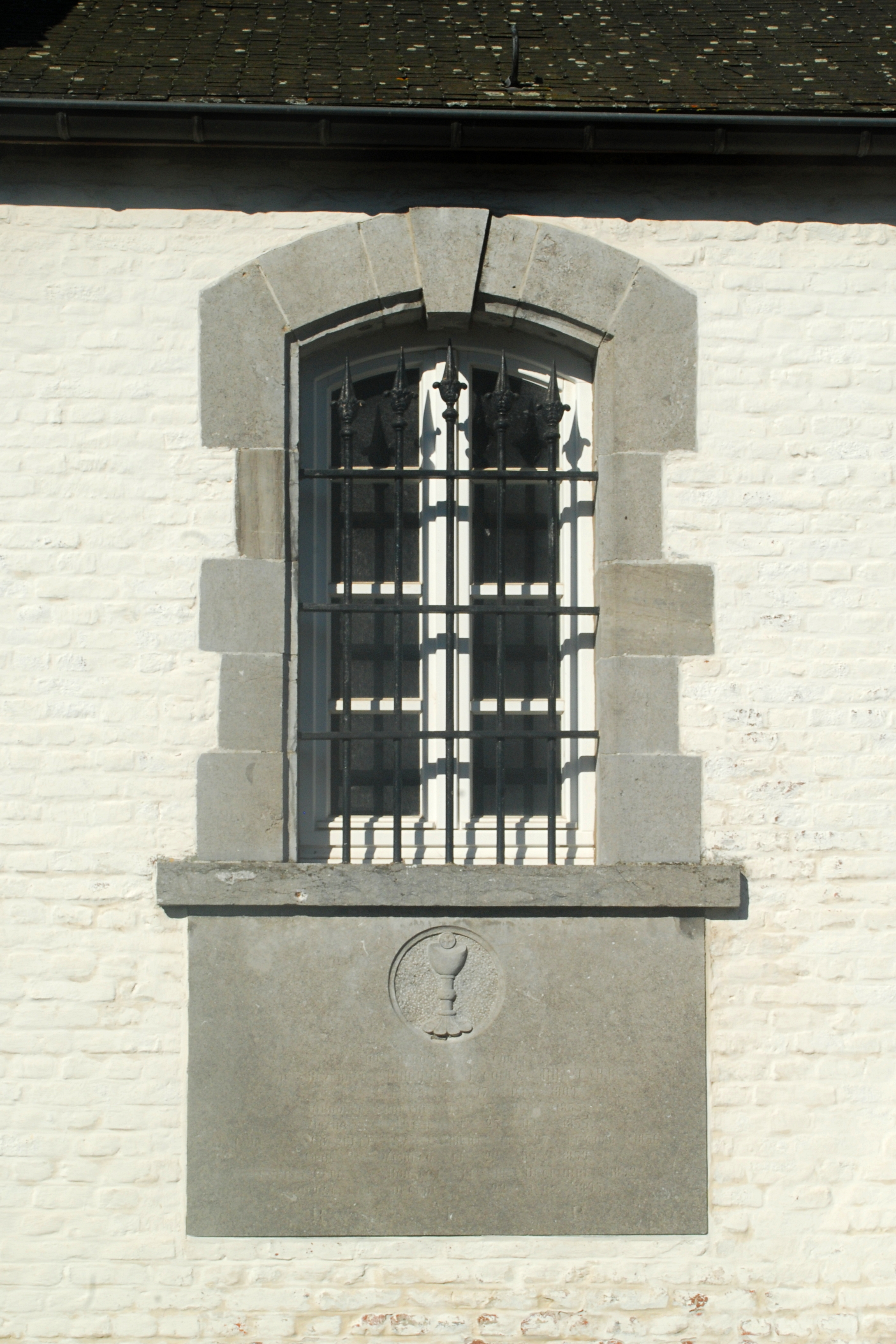 Belgique - Brabant wallon - Nivelles - Bornival - Eglise Saint-François